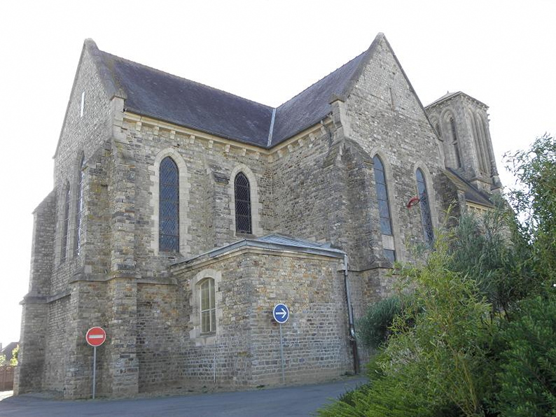 Église de Saint-Christophe-des-Bois (35).